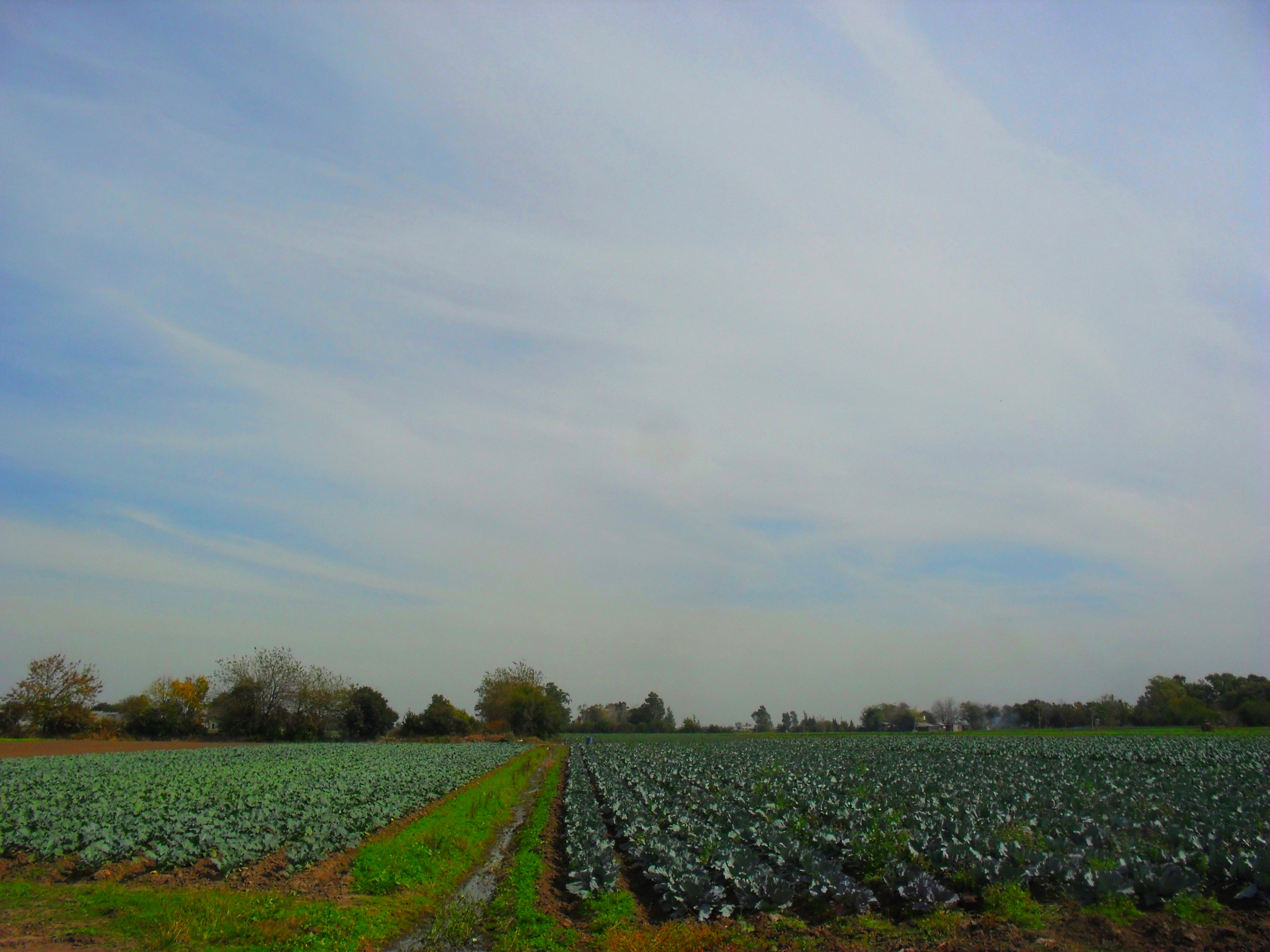 Zona rural en Villa Brown - Florencio Varela